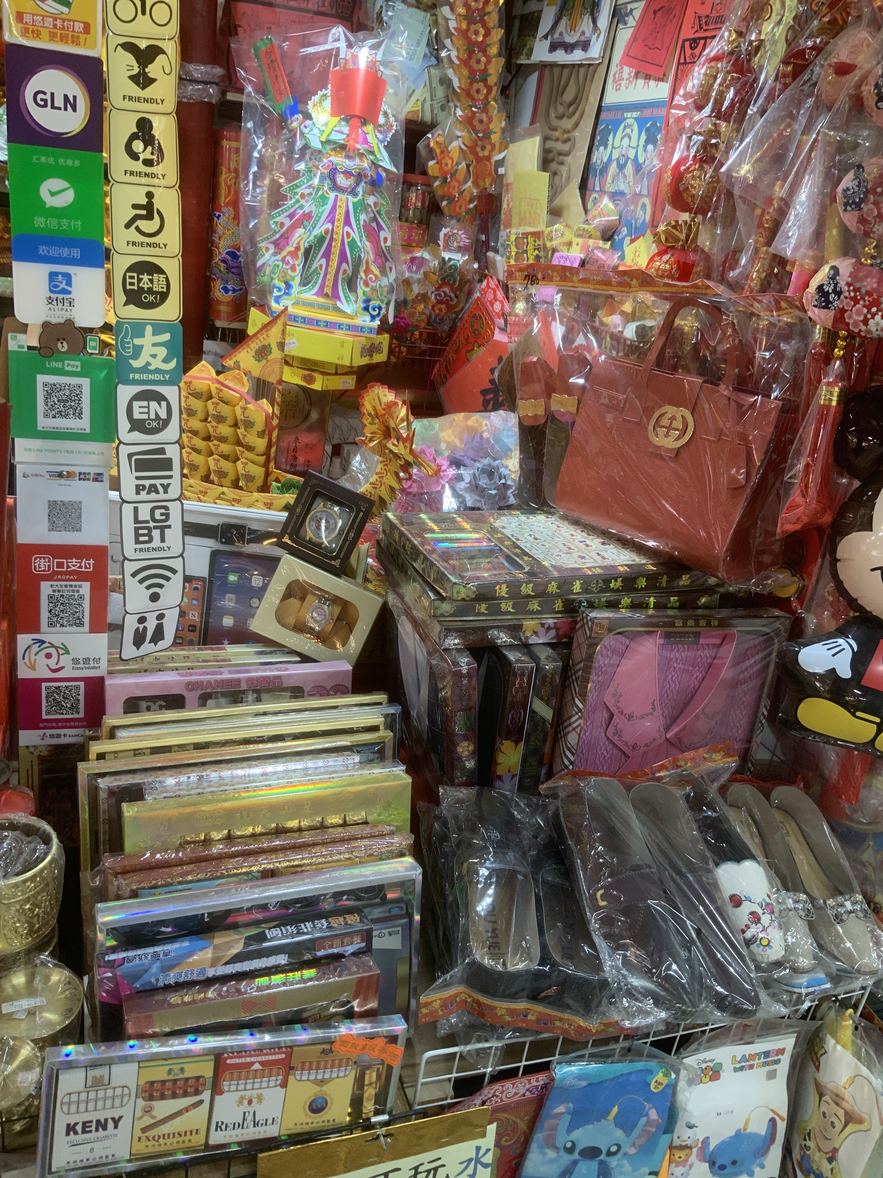 中文（台灣）: 老大生香燭號的各式紙紮用品。